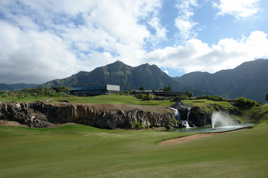 Buenavista del Norte, Tenerife.